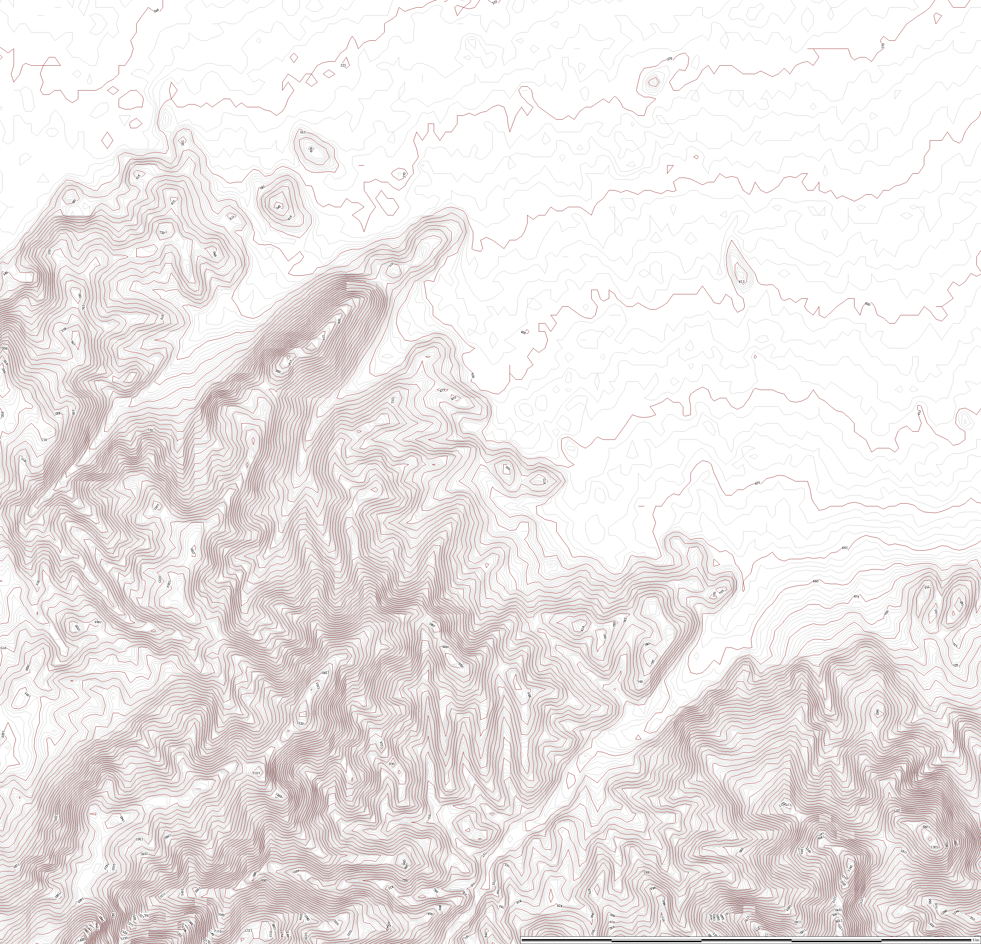 Topografia Braşovului în curbe de nivel cu elevaţie de 3m.